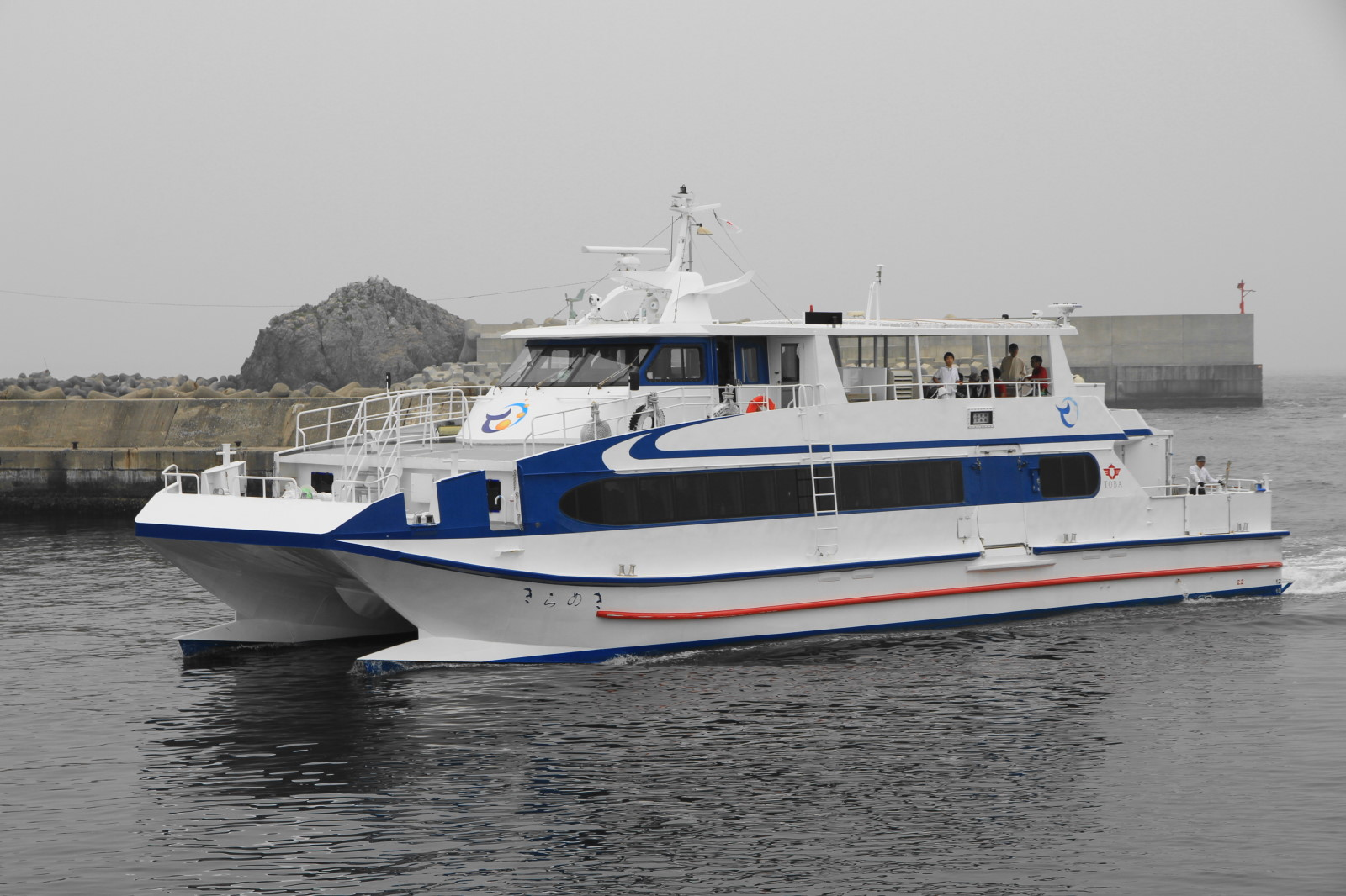 神島港に入港する鳥羽市営定期船「きらめき」